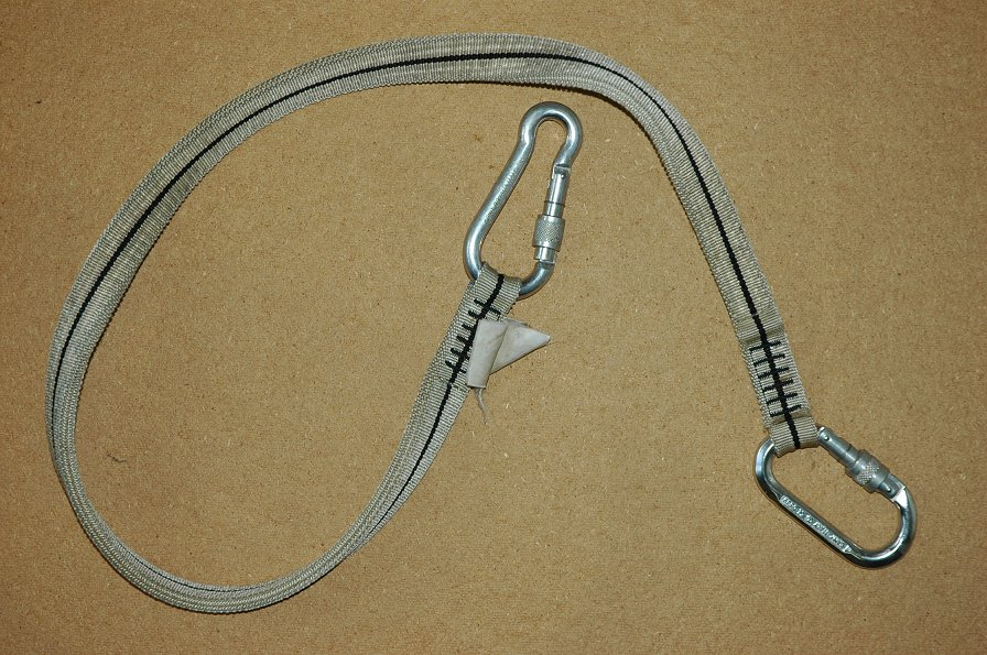 Kambiumschoner, Zubehör für Baumkletterer, um den Baum (das Kambium) zu schonen